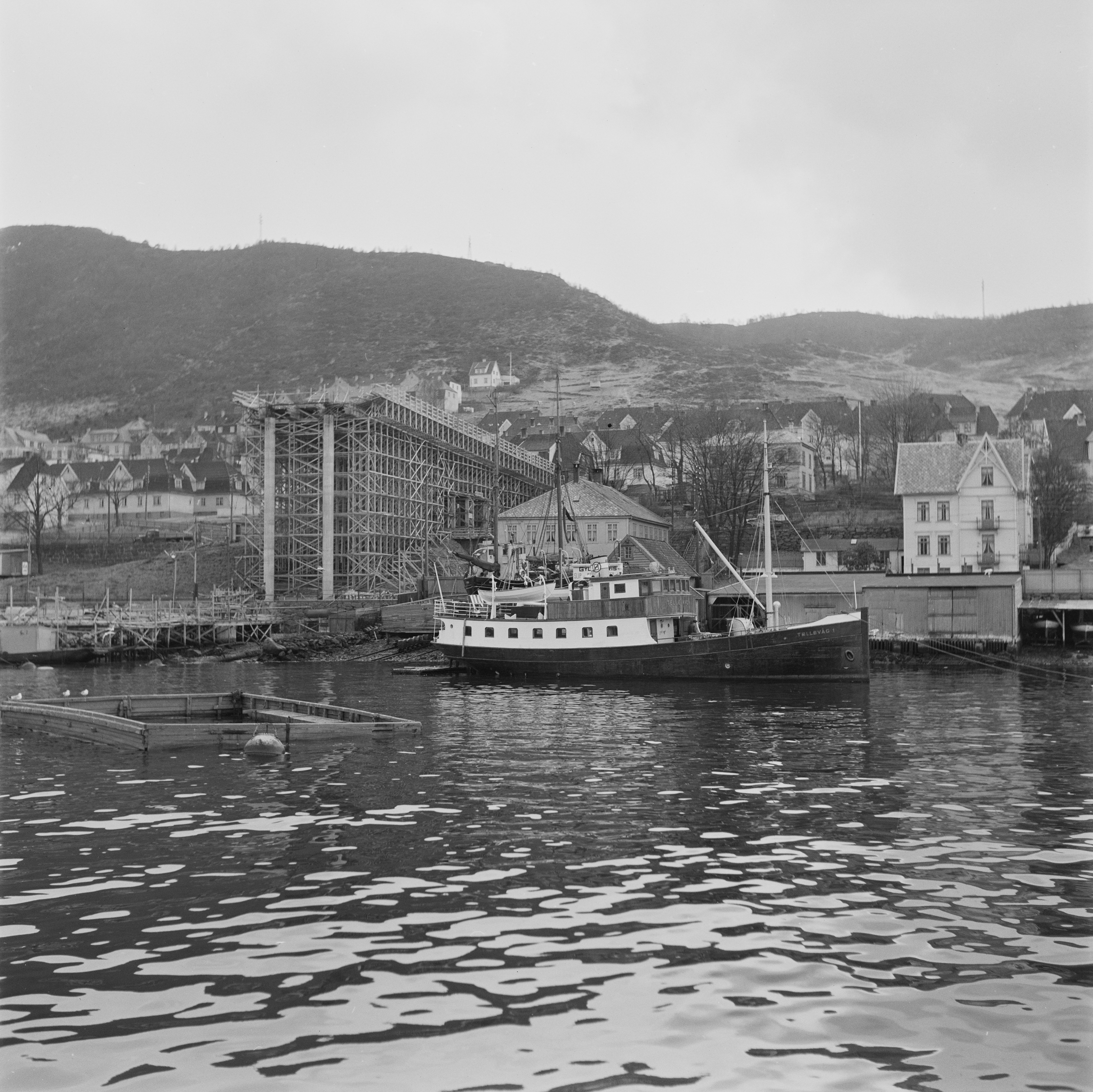 Bildet er hentet fra Arkivverket. Puddefjordsbroen, Bergen. NÅ nr. 2, 1955 Arkivinstitusjon : Riksarkivet Arkivnavn : Billedbladet NÅ Sted : Norge, Hordaland, Bergen, Puddefjordsbroen Emneord: Fjorder, Bymiljø, Arkitektur Avbildet